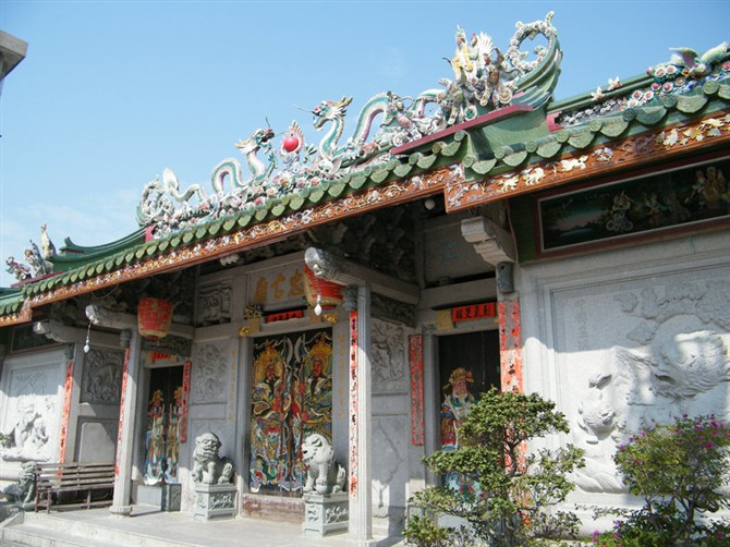 汕頭達濠巡司埠雙忠古廟。